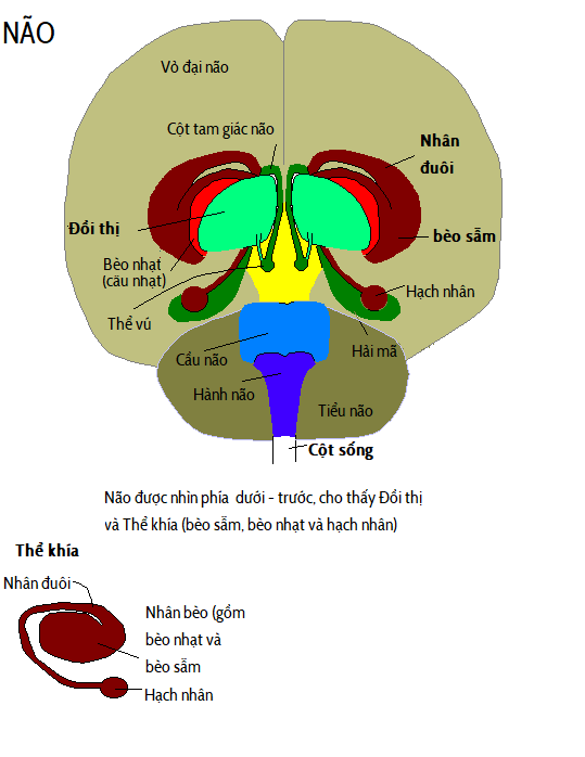 Não và thể khía (nhân bèo và hạch nhân) Bởi The original uploader was RobinH tại Wikibooks Tiếng Anh . – Chuyển từ en.wikibooks sang Commons., CC BY-SA 3.0 , Liên kết